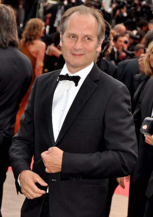 Hippolyte Girardot au Festival de Cannes 2011 pour le film La Conquête, dans lequel il joue le rôle de Claude Guéant